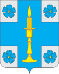 Герб сельского поселения Итомля, Тверская область